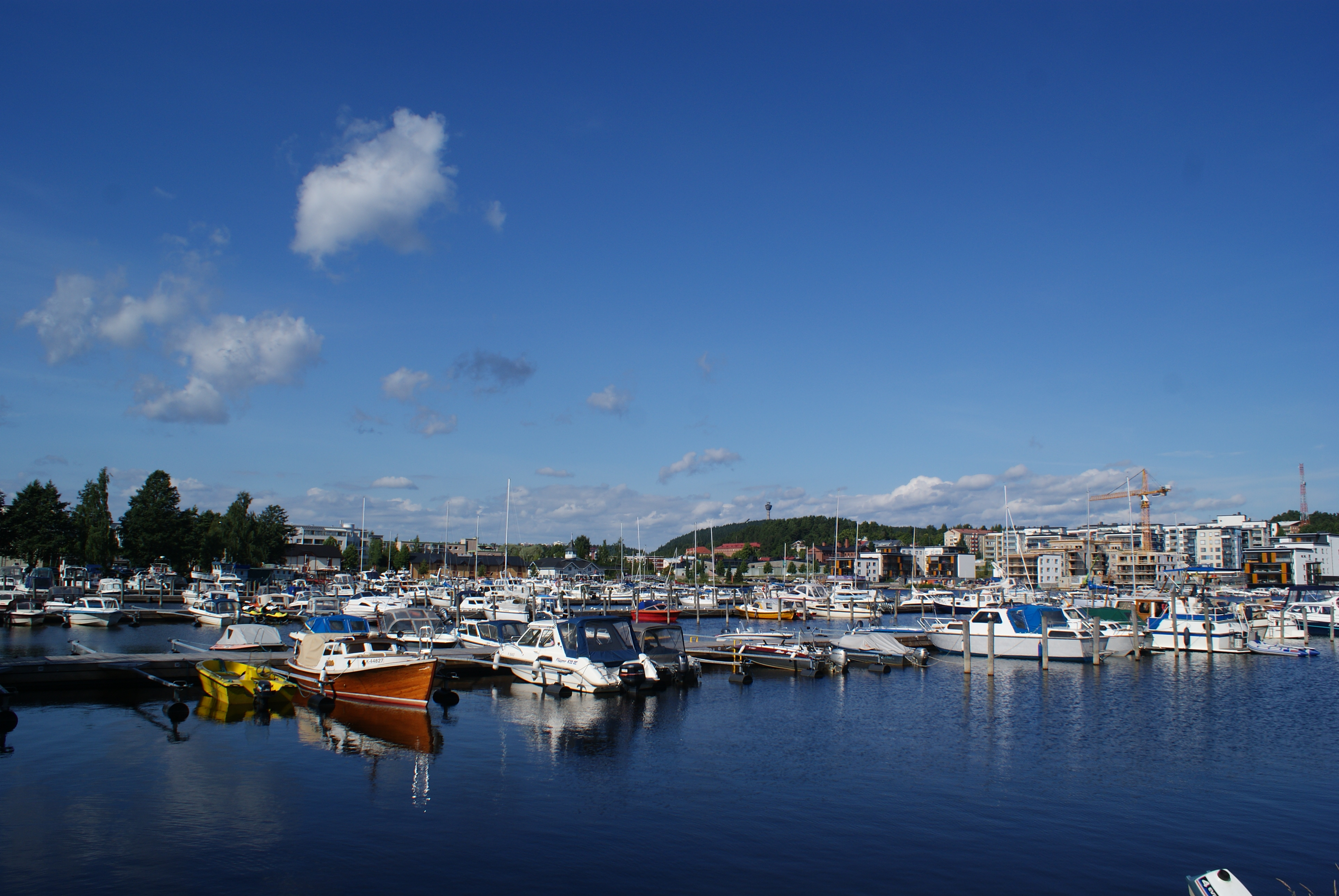 Venesatama. -2017